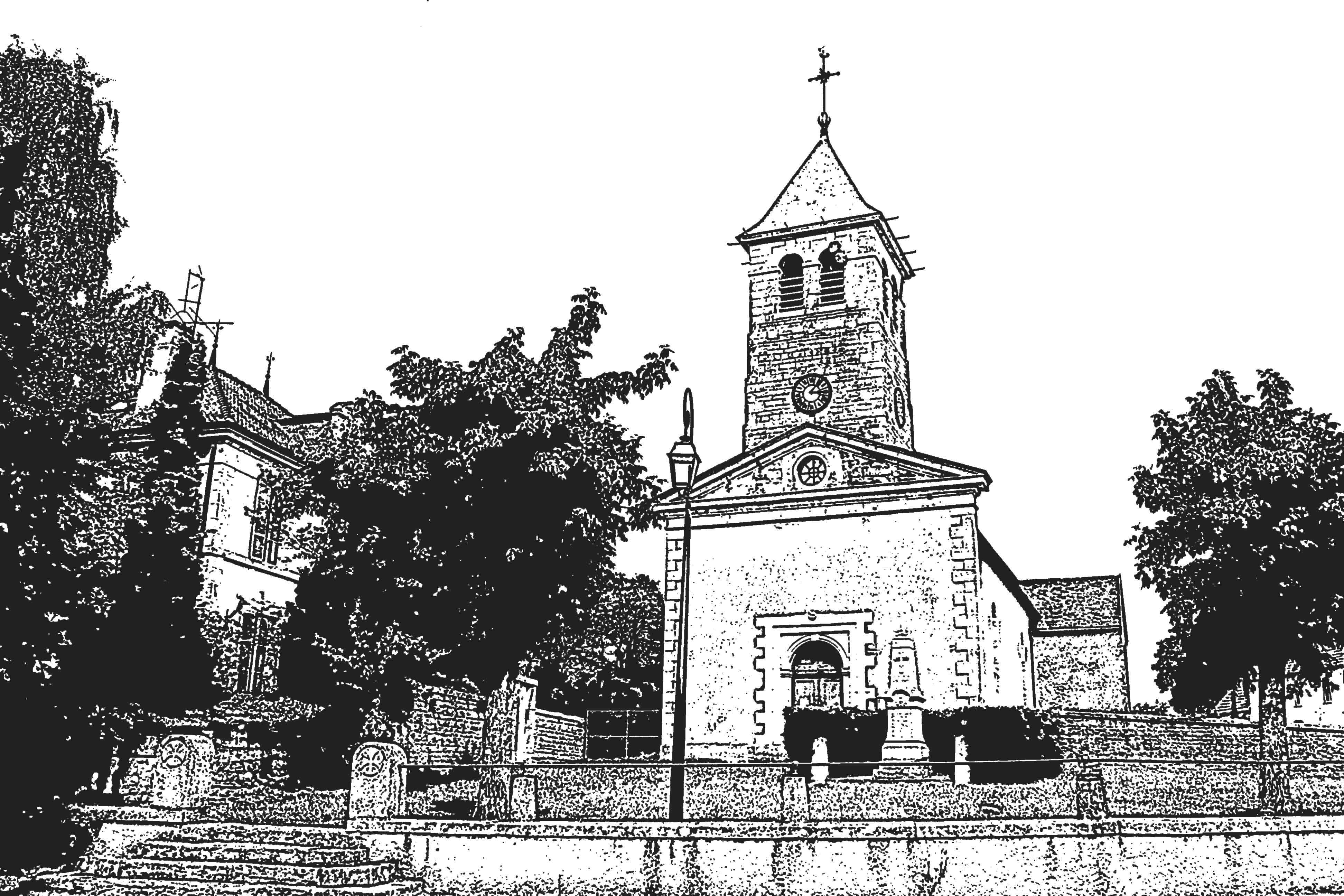 Eglise de notre village de Montmançon